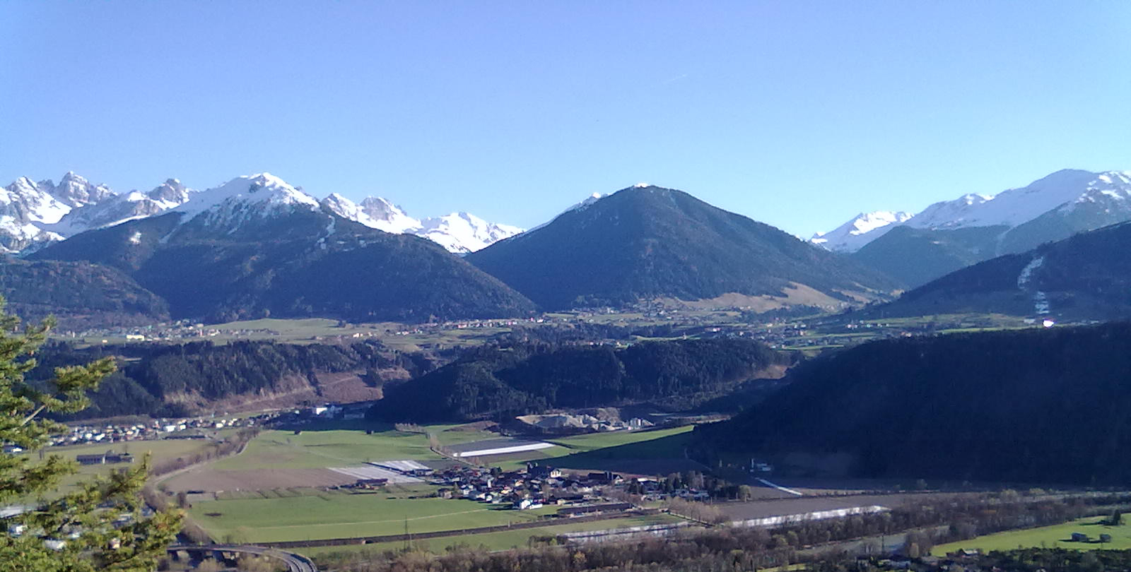 Gemeinde Unterperfuss